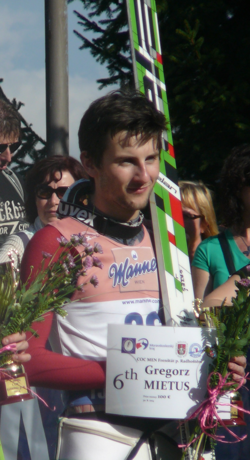 Grzegorz Miętus podczas zawodów Letniego Pucharu Kontynentalnego we Frenstacie (sierpień 2014)